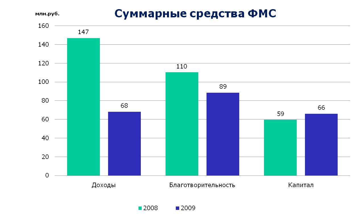 Суммарные средства ФМС за 2008-2009 годы.